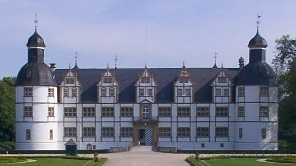 Beschreibung: Schloss Neuhaus: Gartenfront des Schlosses * Quelle: eigene Fotografie * Fotograf/Zeichner: ludger1961 * Datum der Aufnahme: 2005-05-19